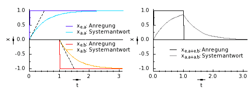 KPLOT + GIMP